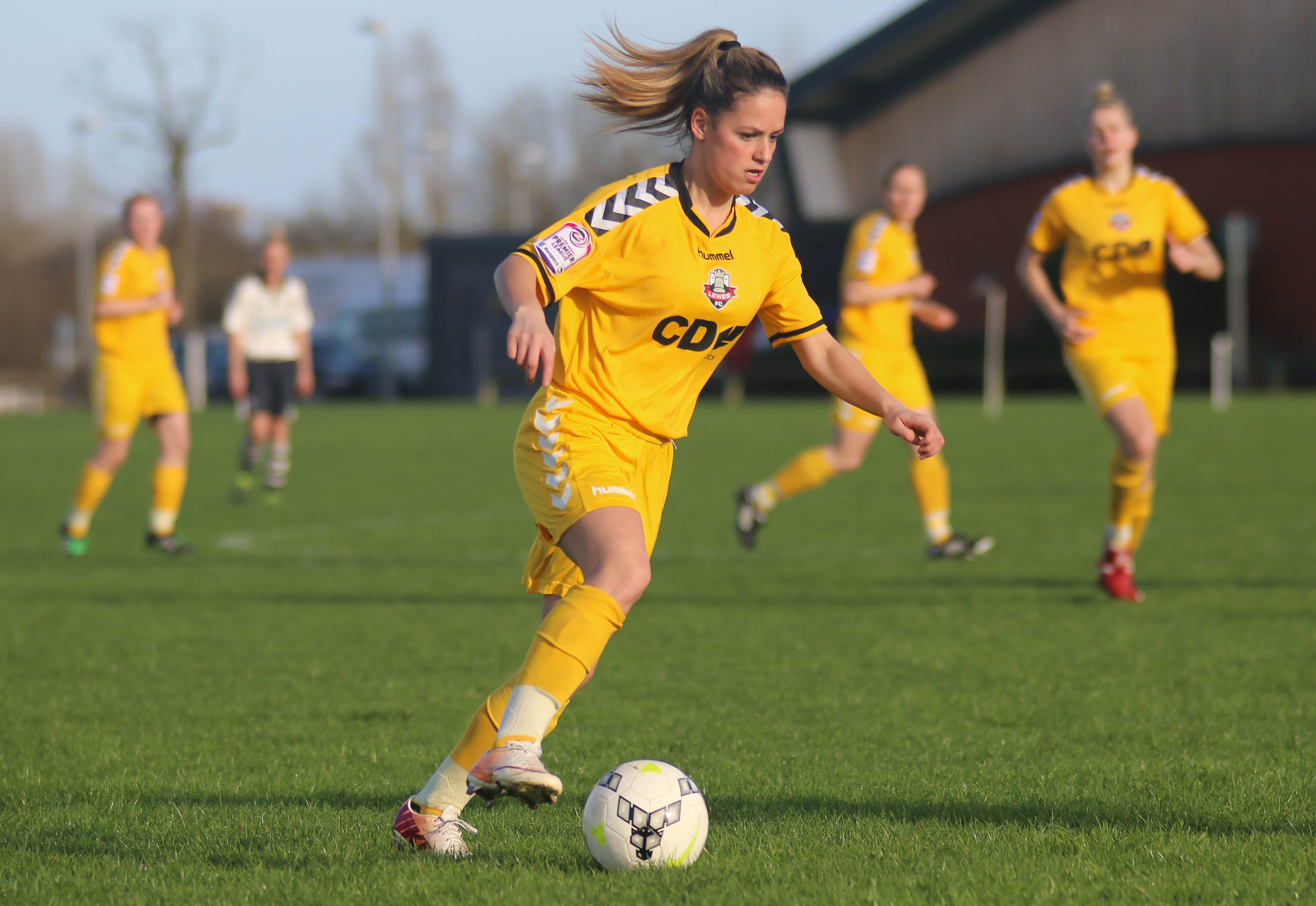 Fulham Foundation Ladies 0 Lewes 10 FAC 10 01 2015-1973.jpg